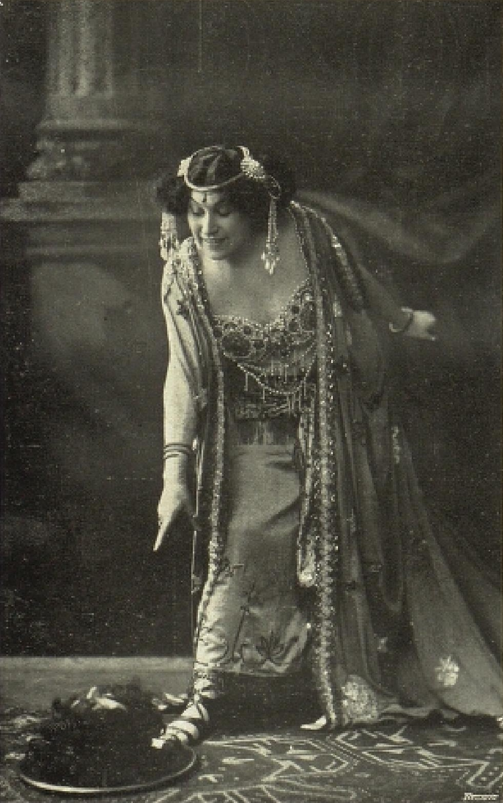 Marie Gärtnerová – Salome v opeře Richarda Strausse